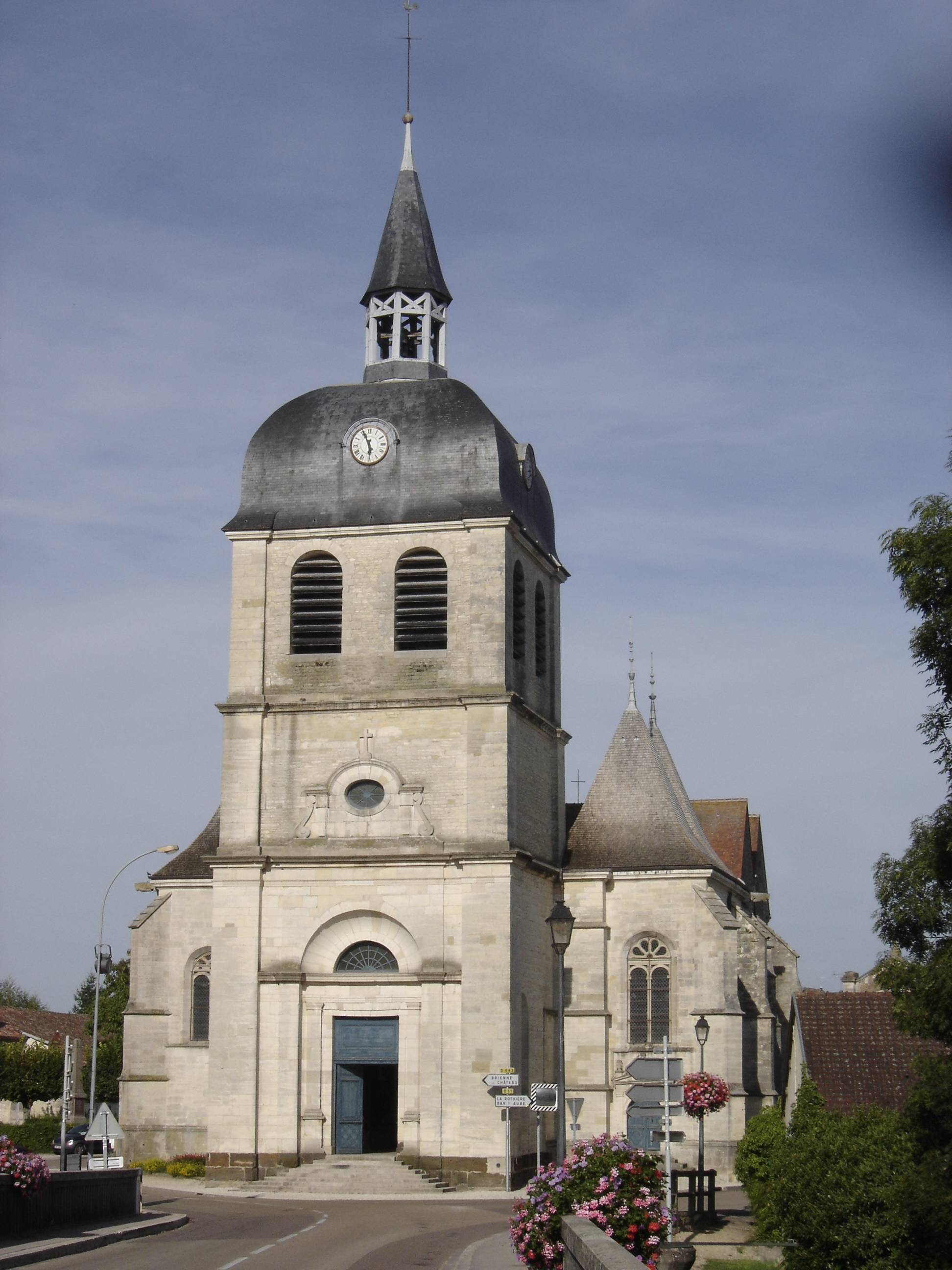 Église Saint-Quentin de Dienville - Aube - France